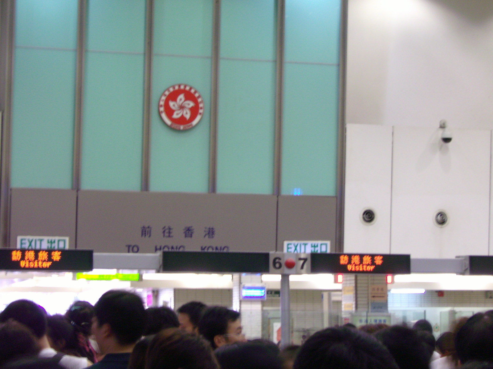 落马洲管制站内的边检